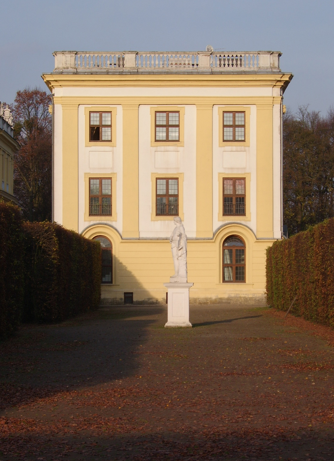 Küchenpavillion, Teil der Orangerie (Kassel), erbaut von Simon Louis du Ry, 1765. selbst photographiert von Carroy am 9.11.2005